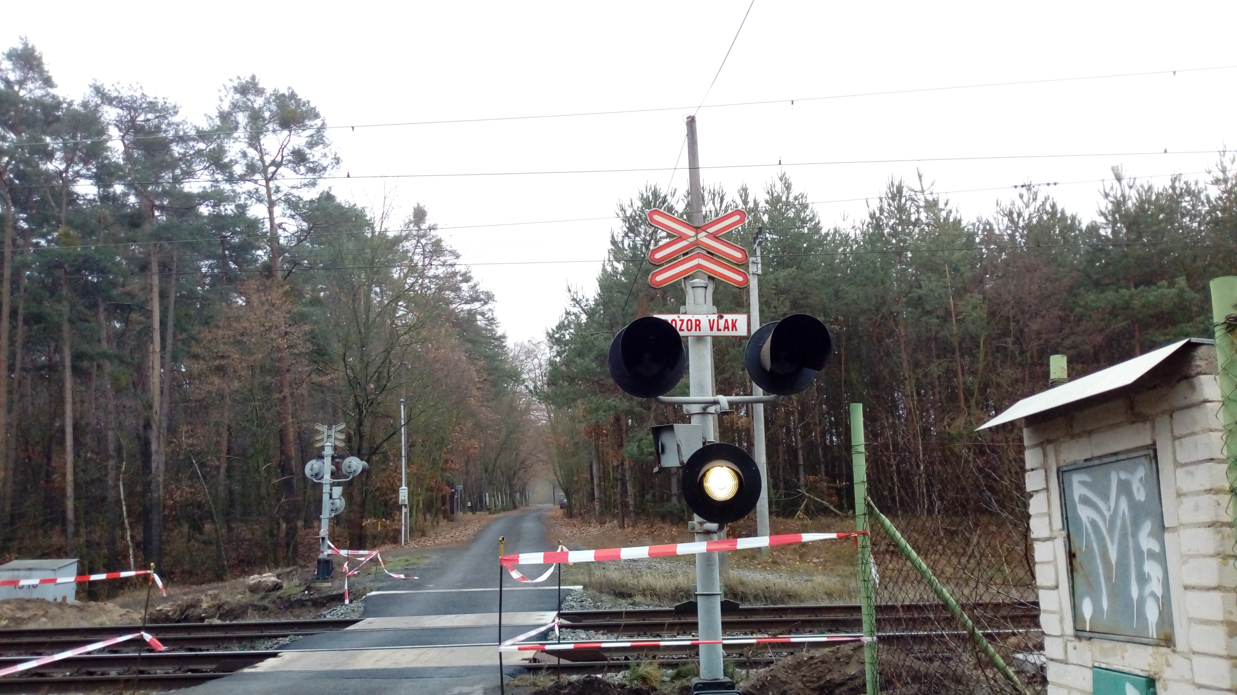 Výstražníky padli 14. 12. 2018